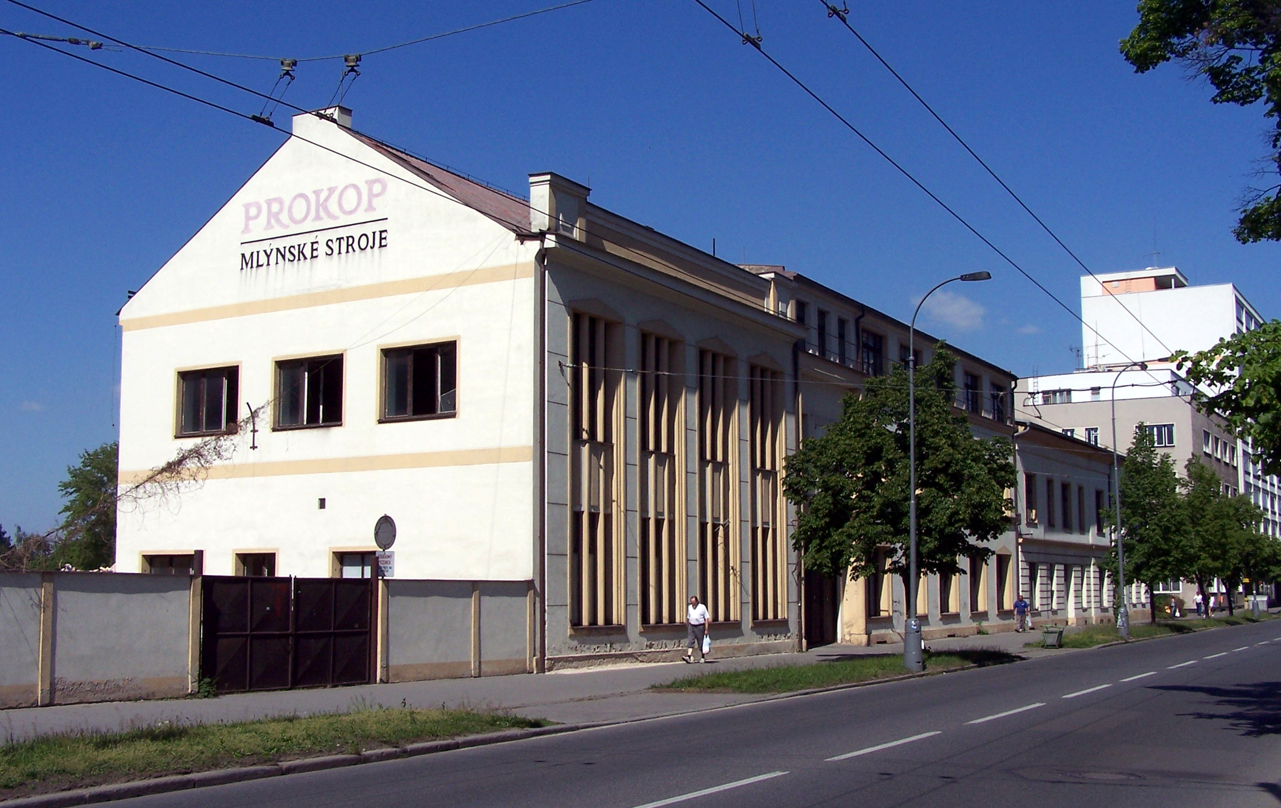 Zbytky továrny na mlýnské stroje Josefa Prokopa synové na Palackého třídě. Loc: 50°2'4.417"N, 15°45'48.61"E